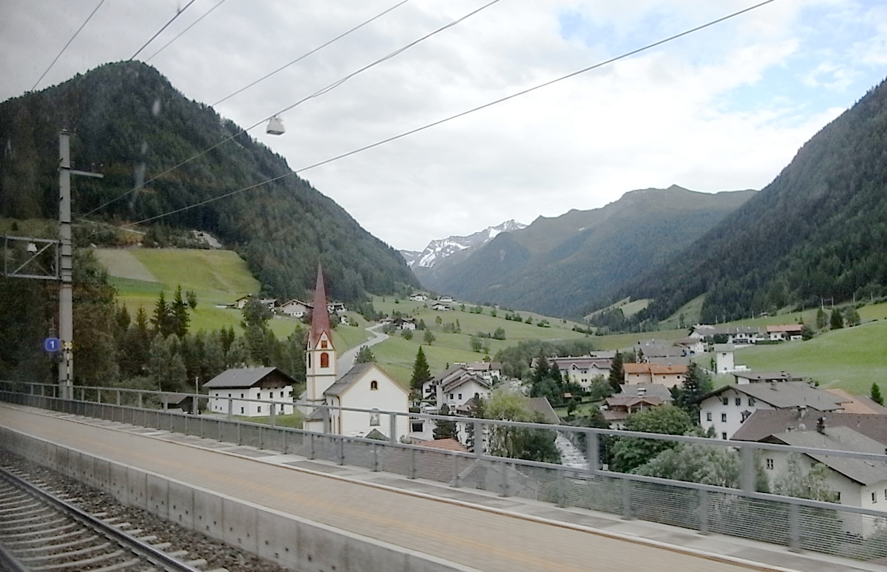 Sankt Jodok (Gemeinde Vals in Tirol) mit Pfarrkirche Hl. Jodok und Isidor. Im Vordergrund die Haltestelle St. Jodok am Brenner.